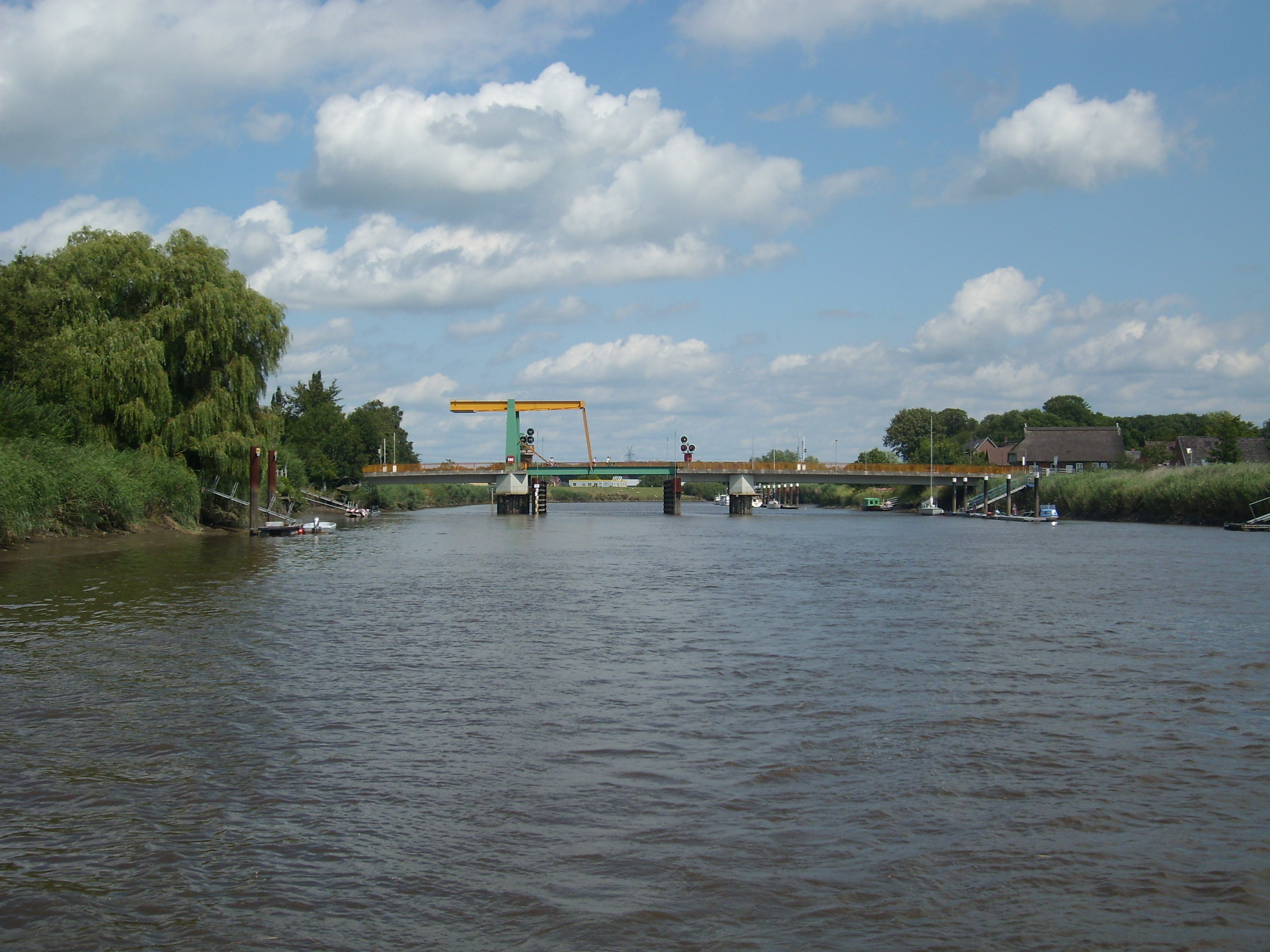 Die Klappbrücke Heiligenstedten von der Stör aus gesehen